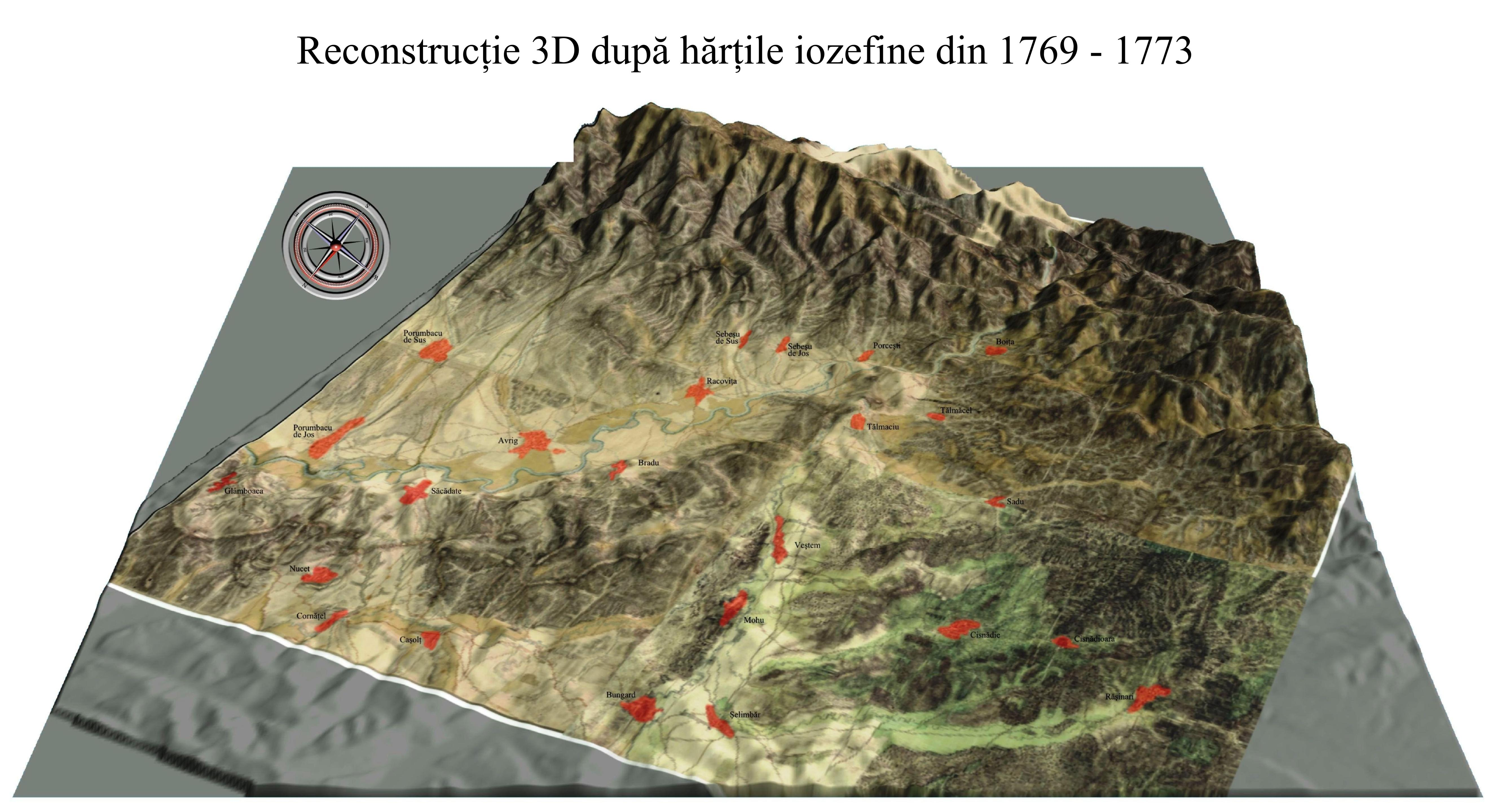 Reconstrucţie 3D la intrarea Oltului în defileul cu acelaşi nume. Reconstrucţia a folosit date SRTM furnizate liber de către NASA şi textura planşelor iozefine nr. 237, 238, 253 şi 254. Programe folosite: 3DEM, CorelDraw, Inkscape.Se poate observa lipsa triangulatiei în ridicarea topografică iozefină prin erorile de poziţionare a traseului Oltului în defileu precum şi erorile de localizare a localităţilor, ce variază între sute de metri şi unul până la trei km. Date tehnice 3D: Terrain Vert Mag: 150% Terrain Illumination: 240deg azimuth 60deg elevation Project size: 1024x768px